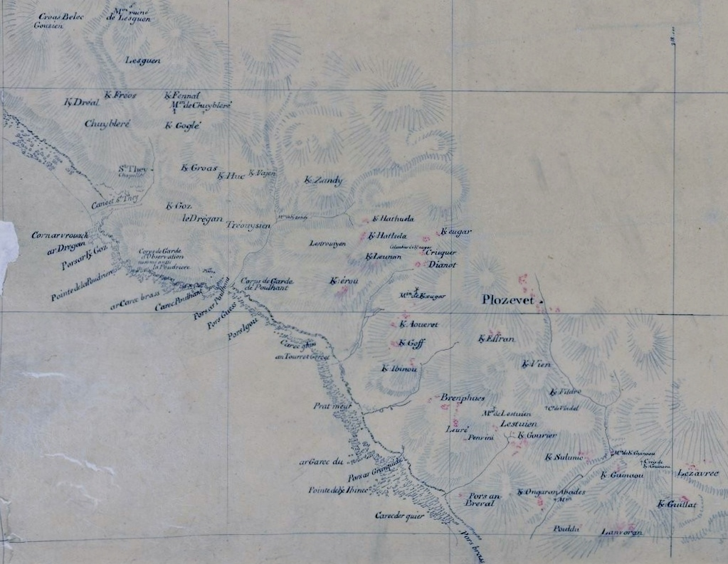 Carte de Plozévet datant de la période 1771-1785.